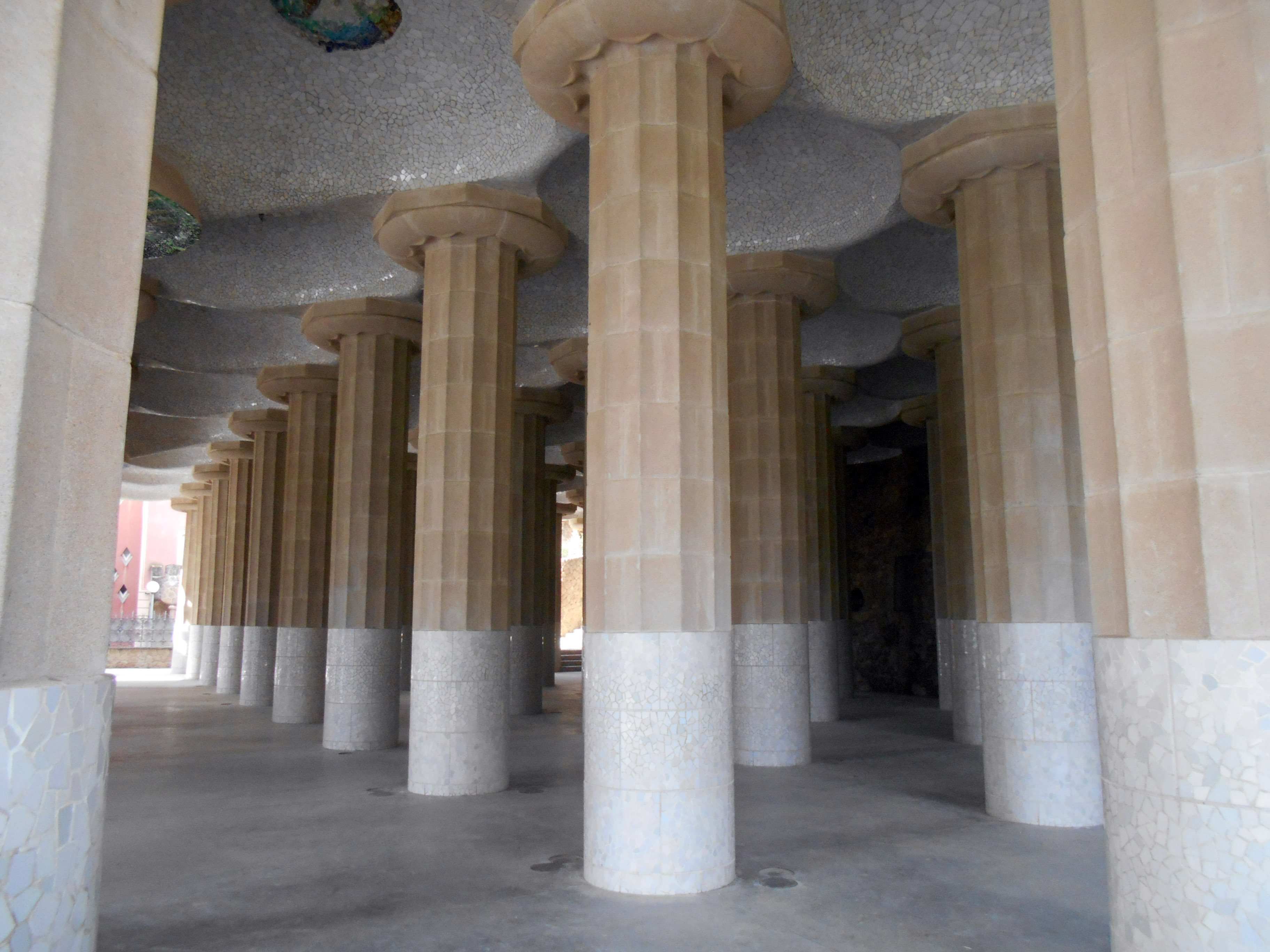 Sala hipóstila.